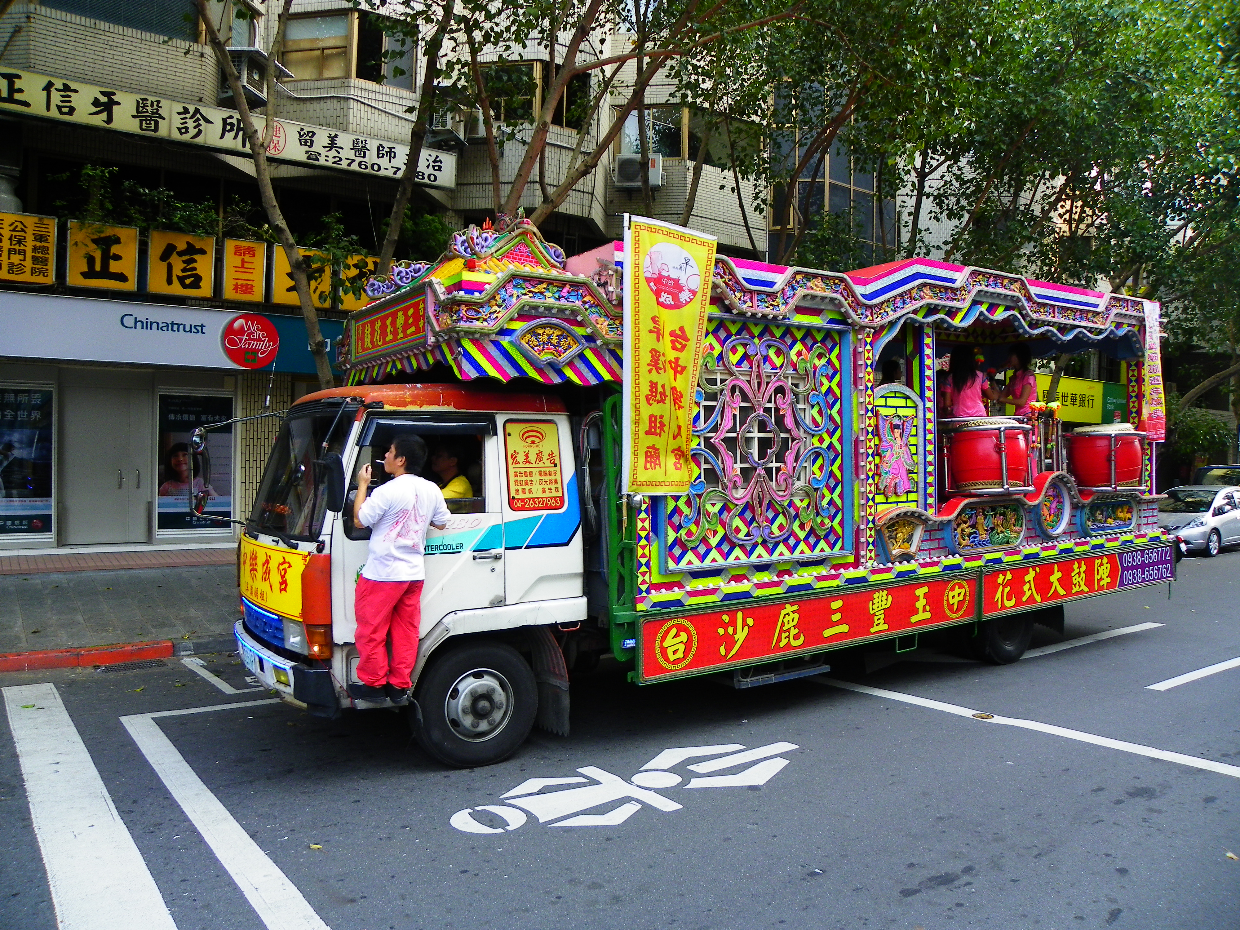 中文（台灣）: 松山慈祐宮建宮260週年紀念媽祖遶境，台中樂成宮三菱復興花鼓車。